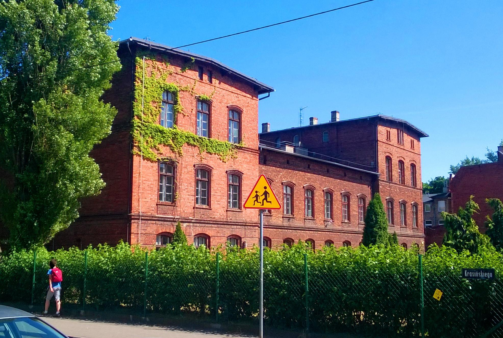 Dawny budynek Szkoły Powszechnej w Toruniu1